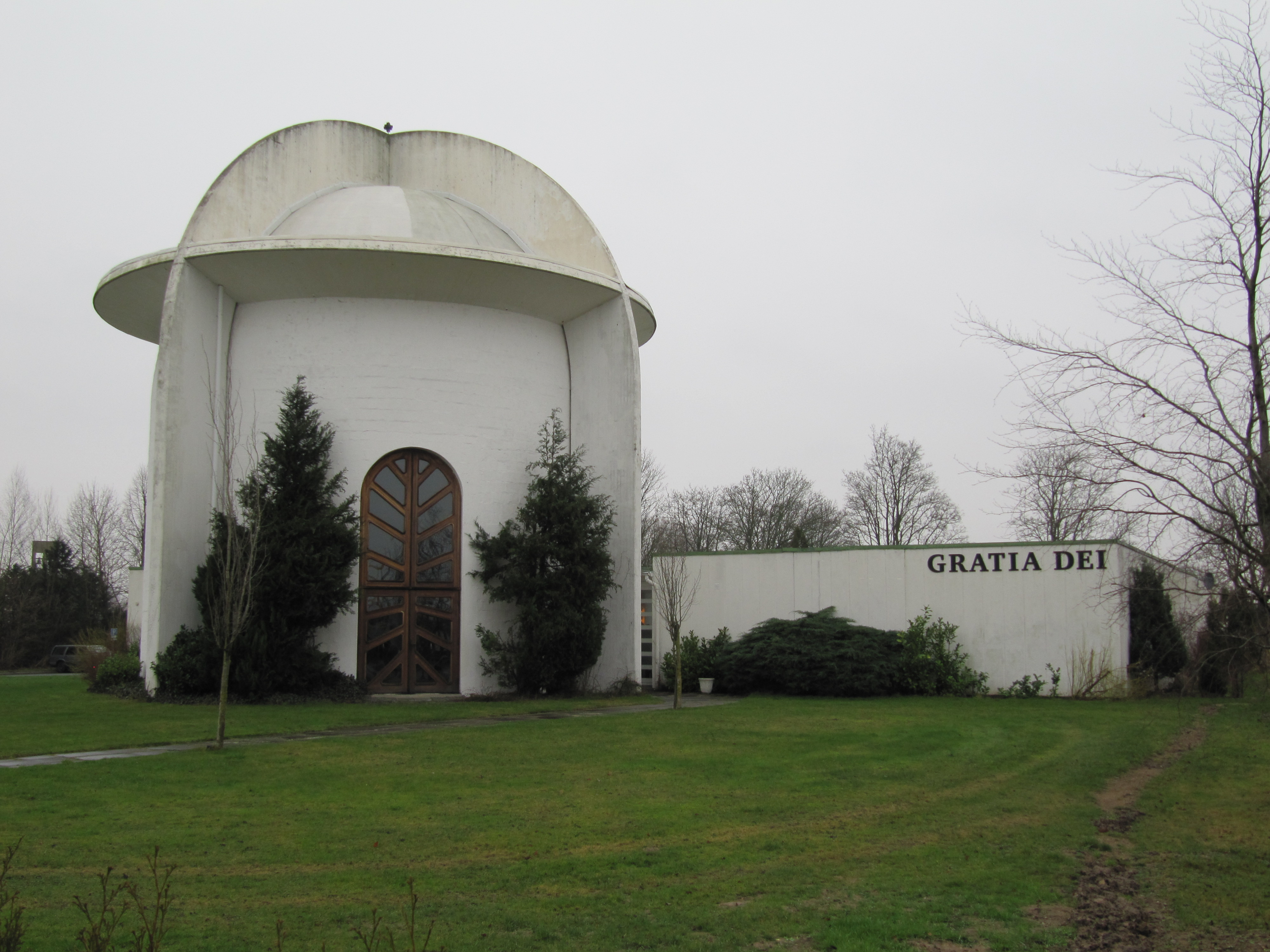 Himmelska glädjens kapell från sydväst.